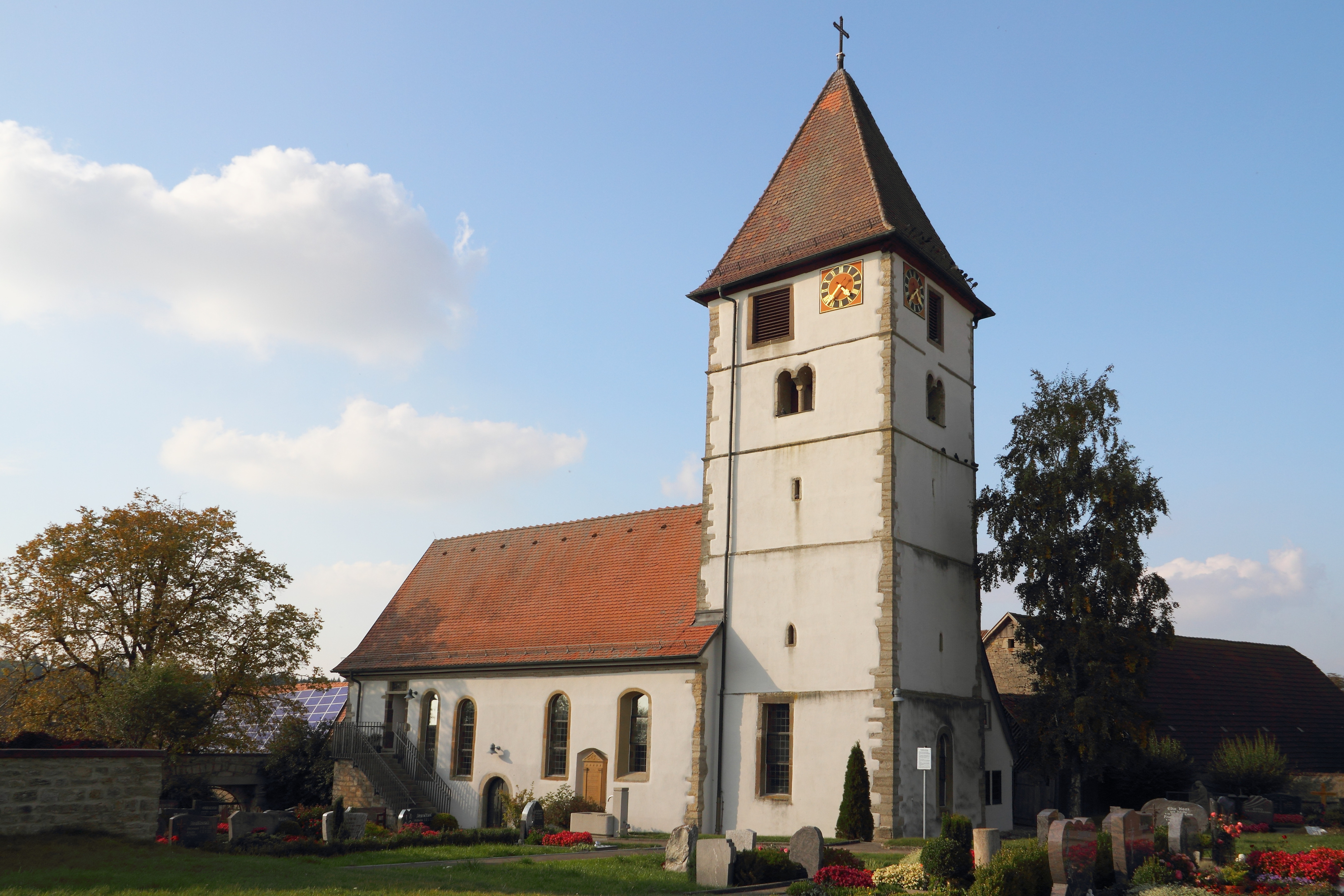 Die evang. Pfarrkirche im Niederstettener Ortsteil Rinderfeld.